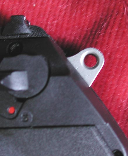 cane arrotondato di pistola semiautomatice